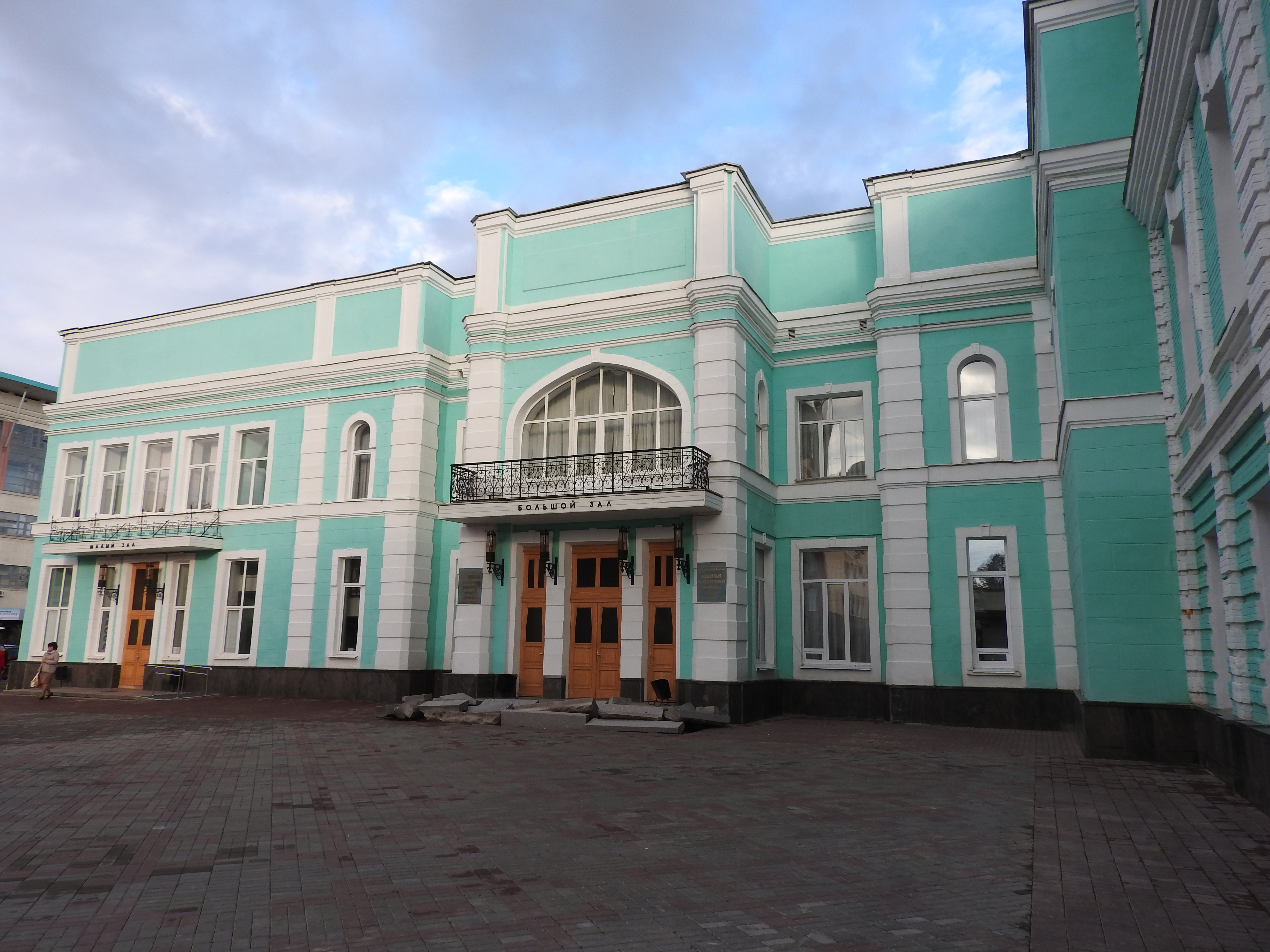 Фасад здания филармонии